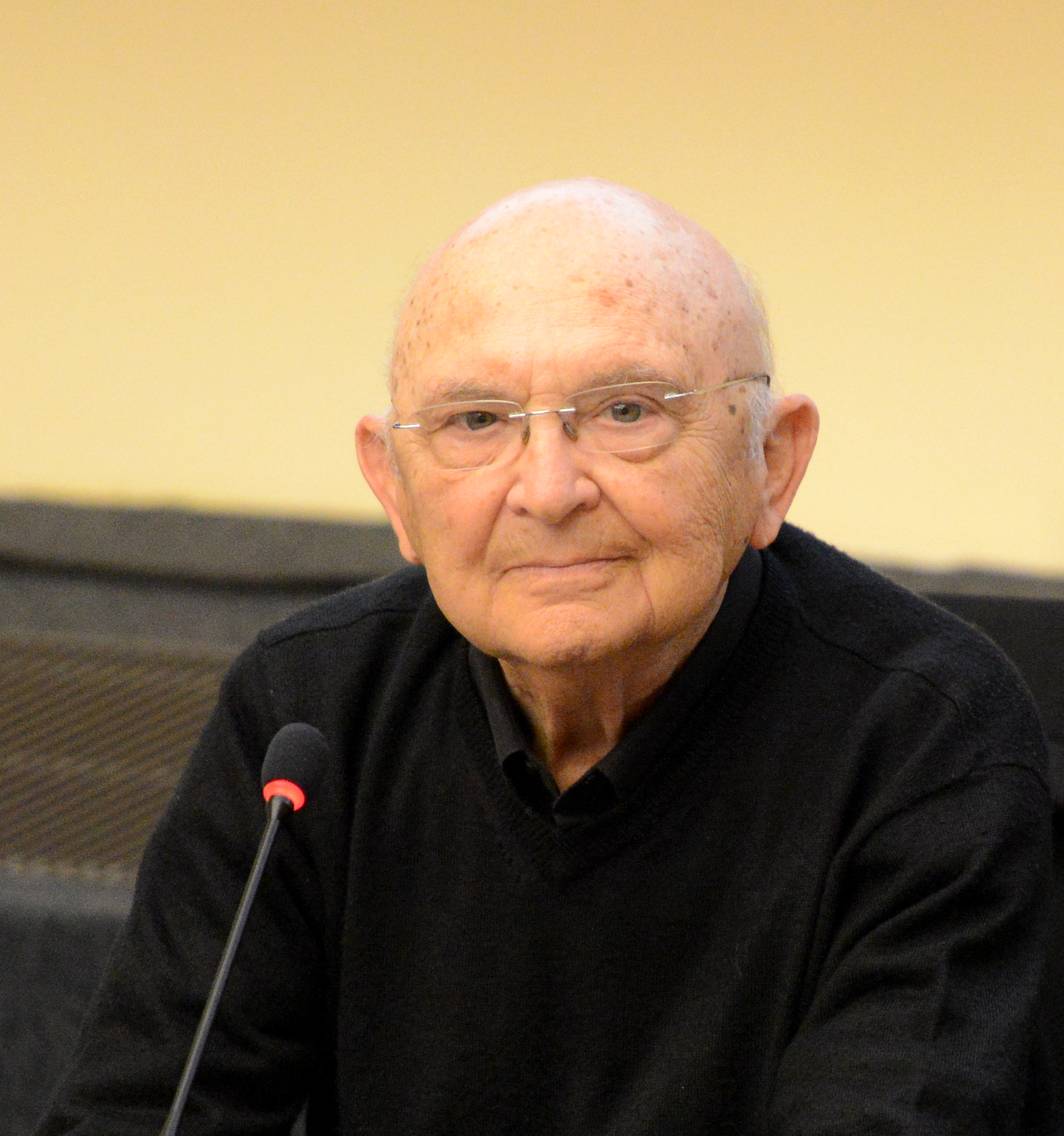 "Aharon Appelfeld, Rencontre et entretien Marc Rettel". Den Aharon Appelfeld am Espace culturel Cité, 22. Mee 2014.